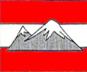 Austrian Armenian Cultural Society